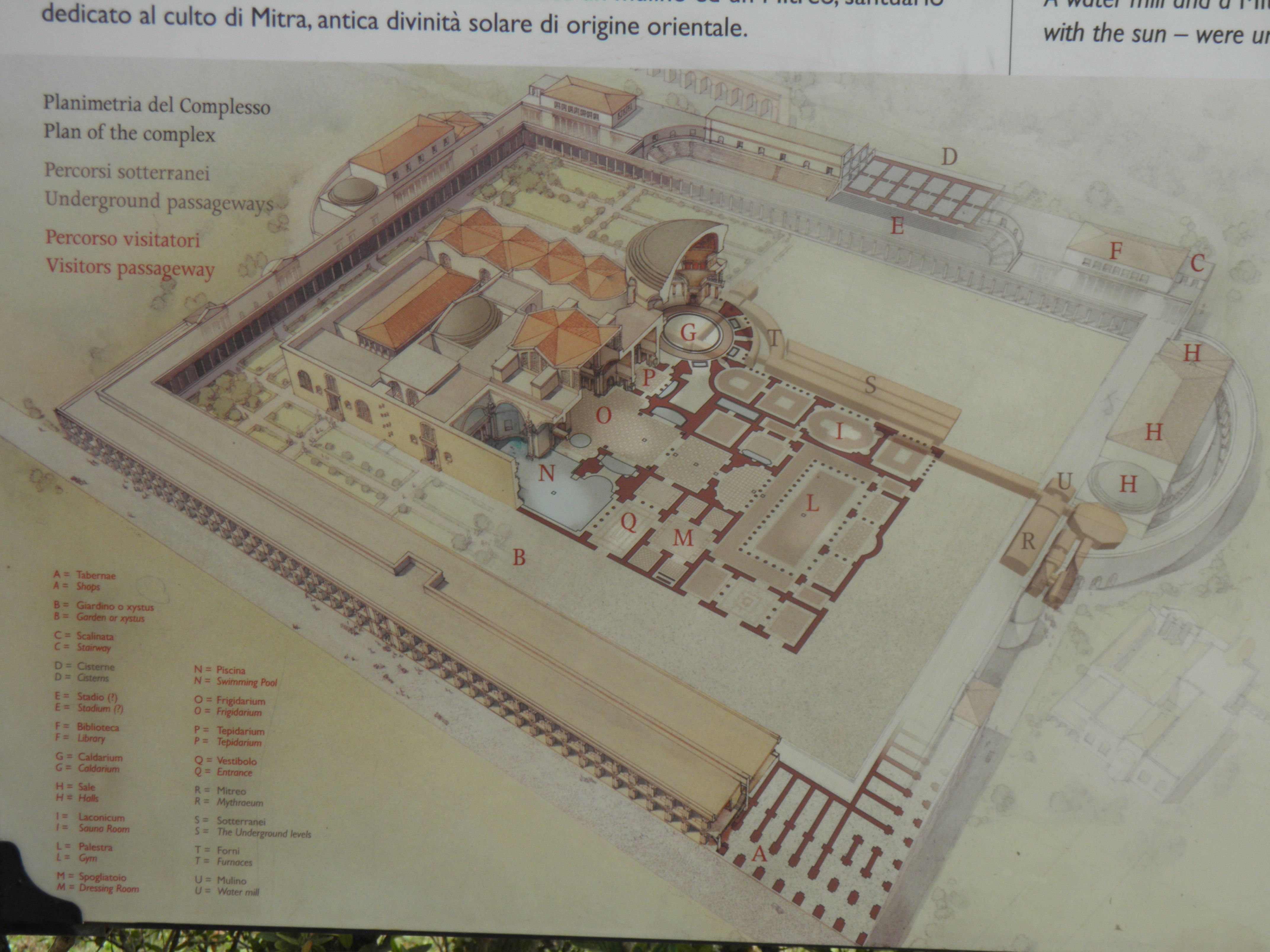 Plan des thermes de Caracalla à Rome (Italie).